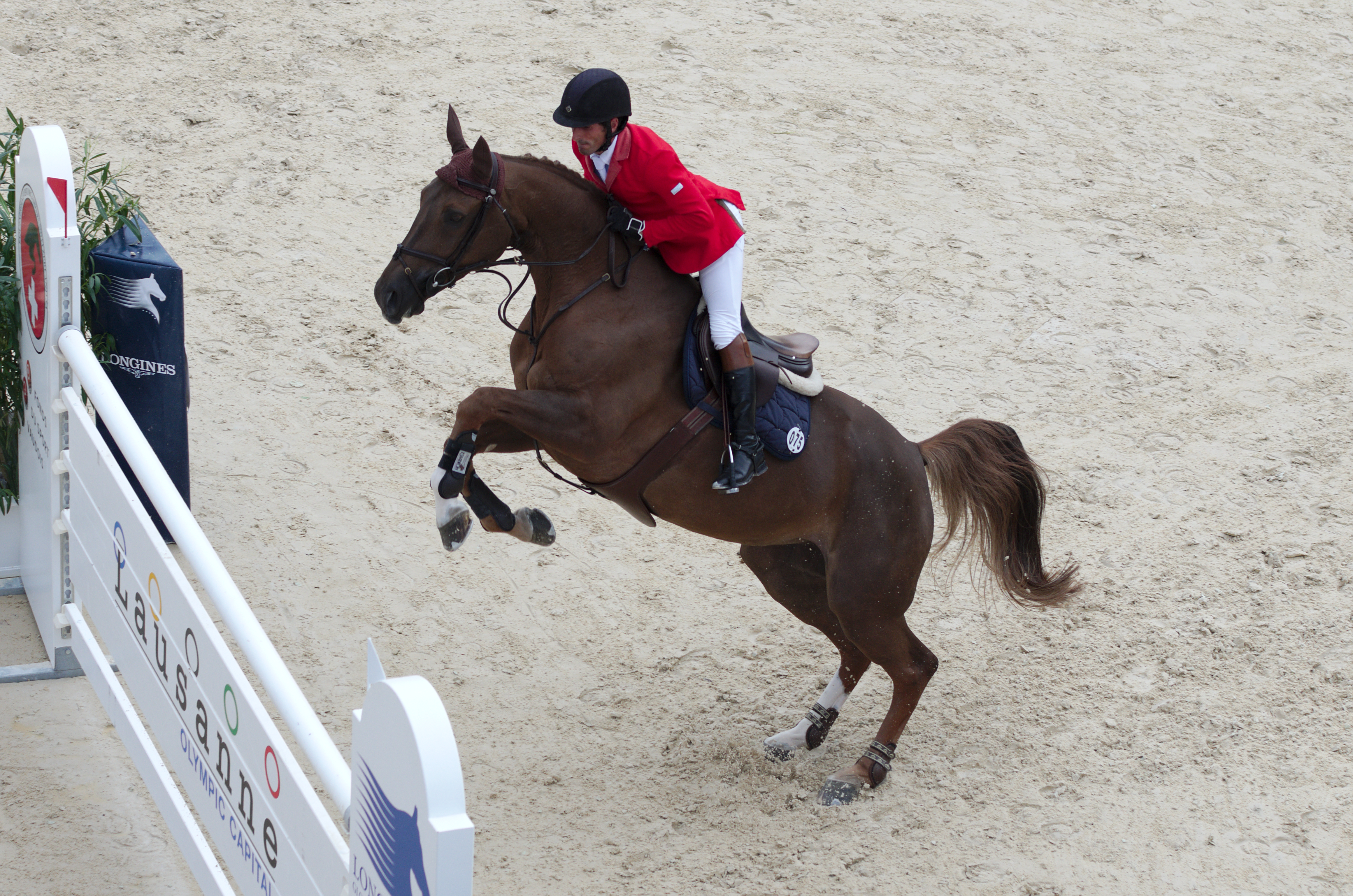 2013 Longines Global Champions - Lausanne - 14-09-2013 - Arthur Da Silva et Qui Vive de la Tour